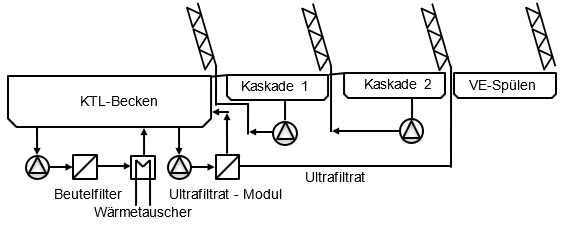 Extrem vereinfachte Darstellung einer KTL-Anlage